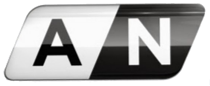 Logo de Aragón Noticias desde 2013